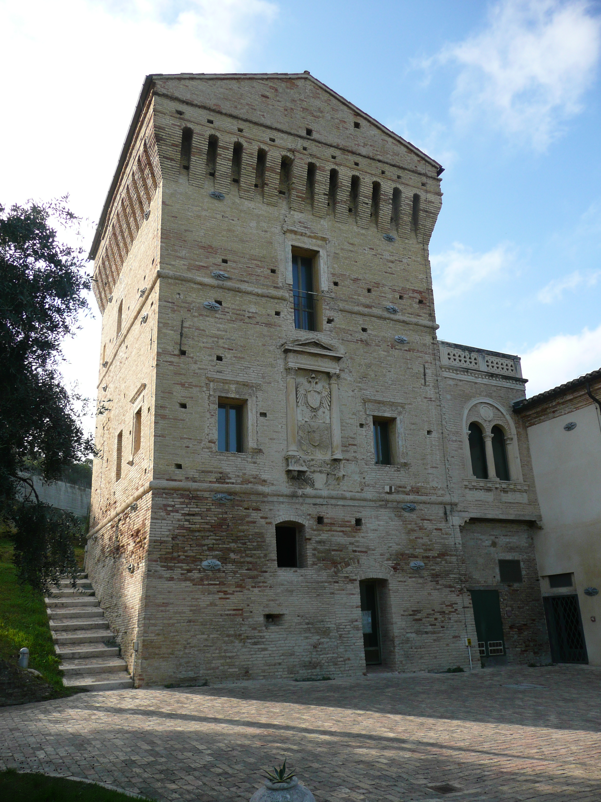 La Torre di Martinsicuro o Torre di Carlo V, si trova sulla costa dell'Adriatico, in provincia di Teramo, vicino alla foce del Tronto, nel comune di Martinsicuro